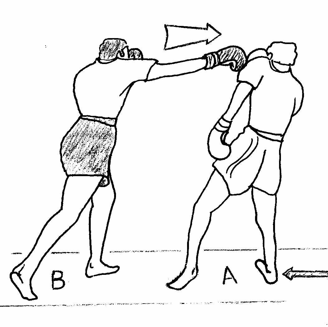 bloc_épaule1.jpg